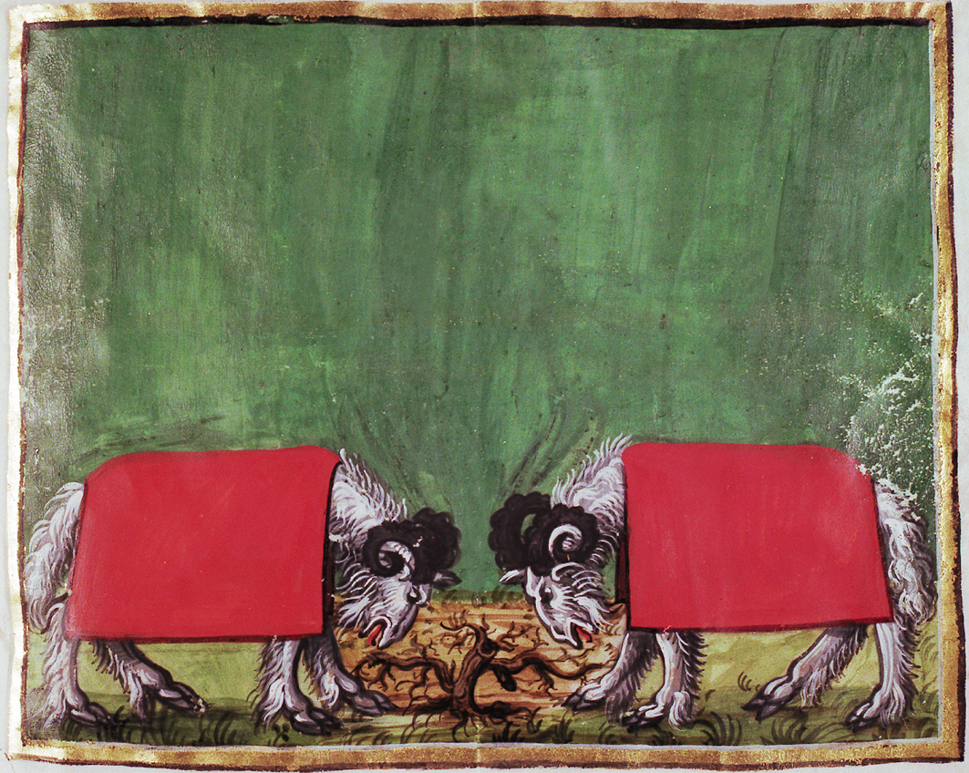 Darstellung der Blutwidder-Abgabe aus Urbar im Salzburger Landesarchiv, die Herkunft ergibt sich aus dem unter verlinkten Video